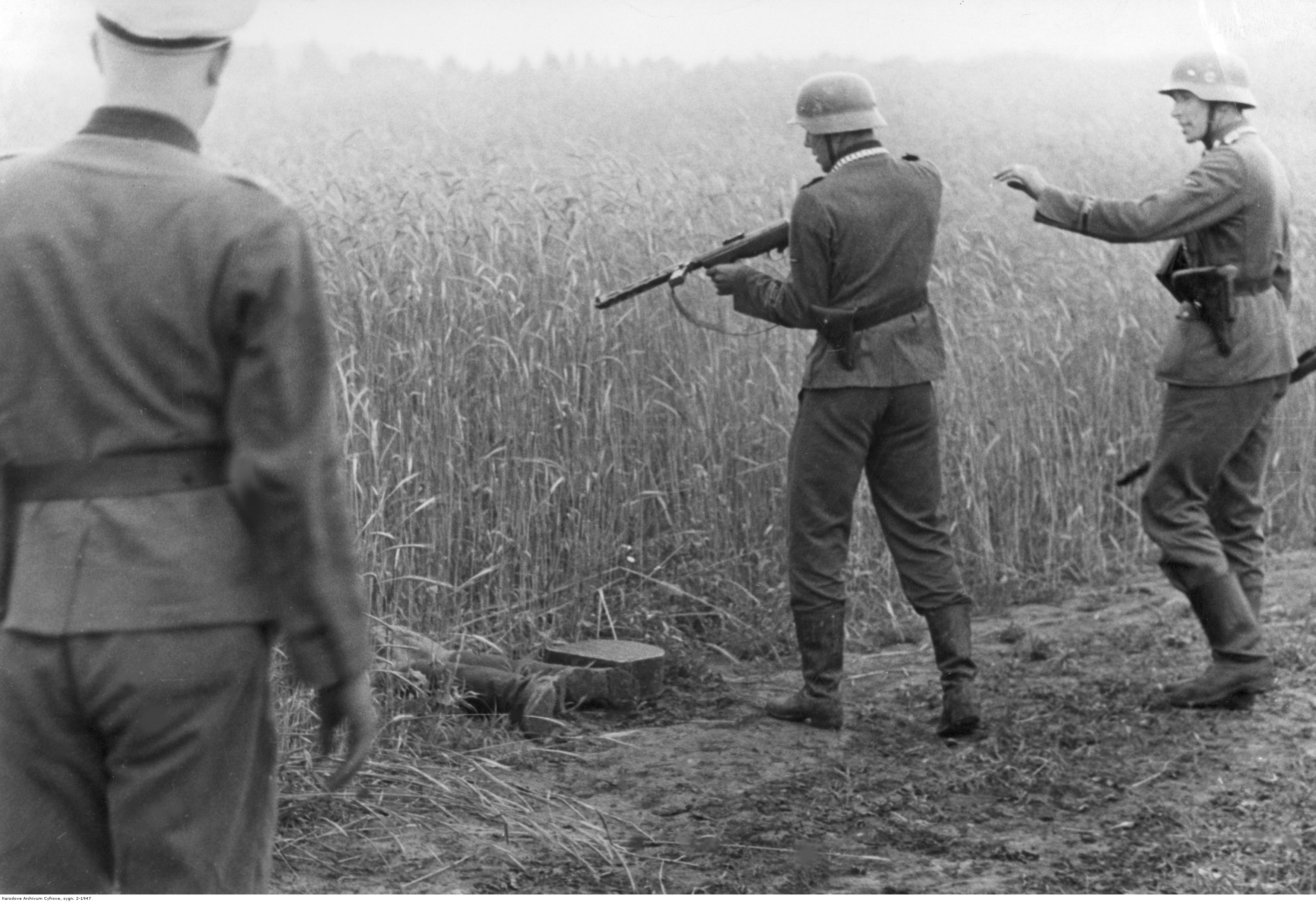 Zabicie cywila przez żołnierzy Waffen SS na froncie wschodnim. Widoczny żołnierz z pistoletem maszynowym Erma EMP-35.